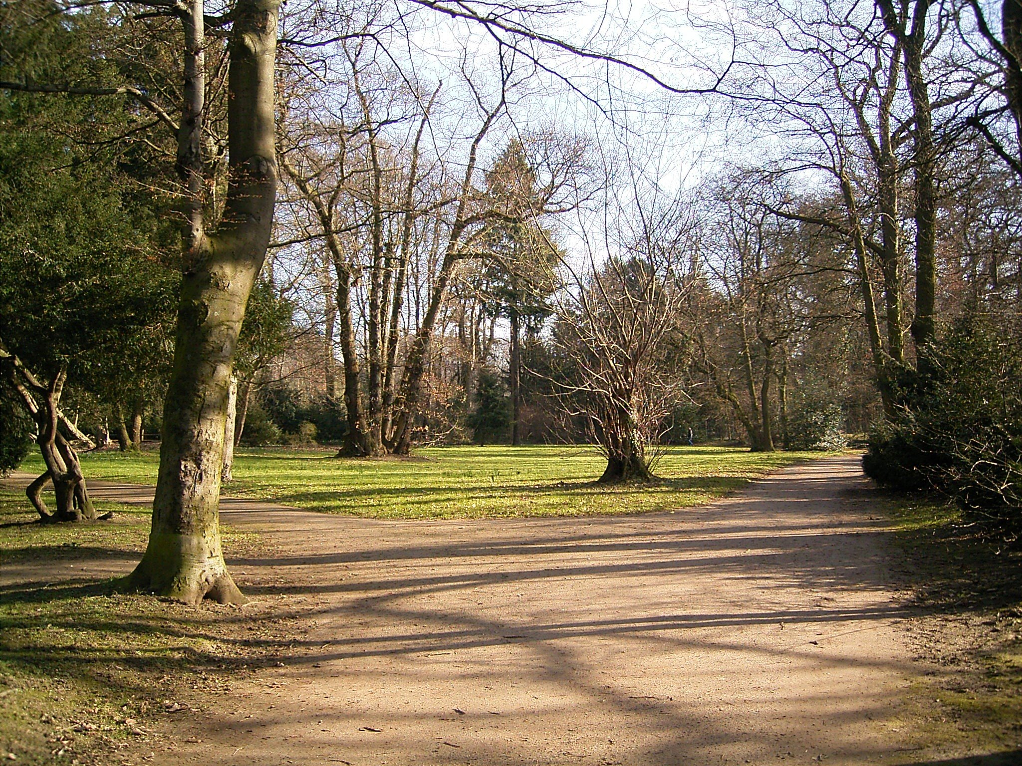 Schloss Garath in Düsseldorf